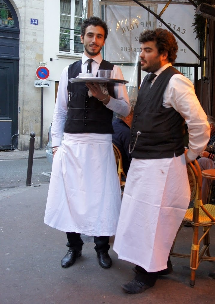 Deux serveurs, rue de Seine à Paris.